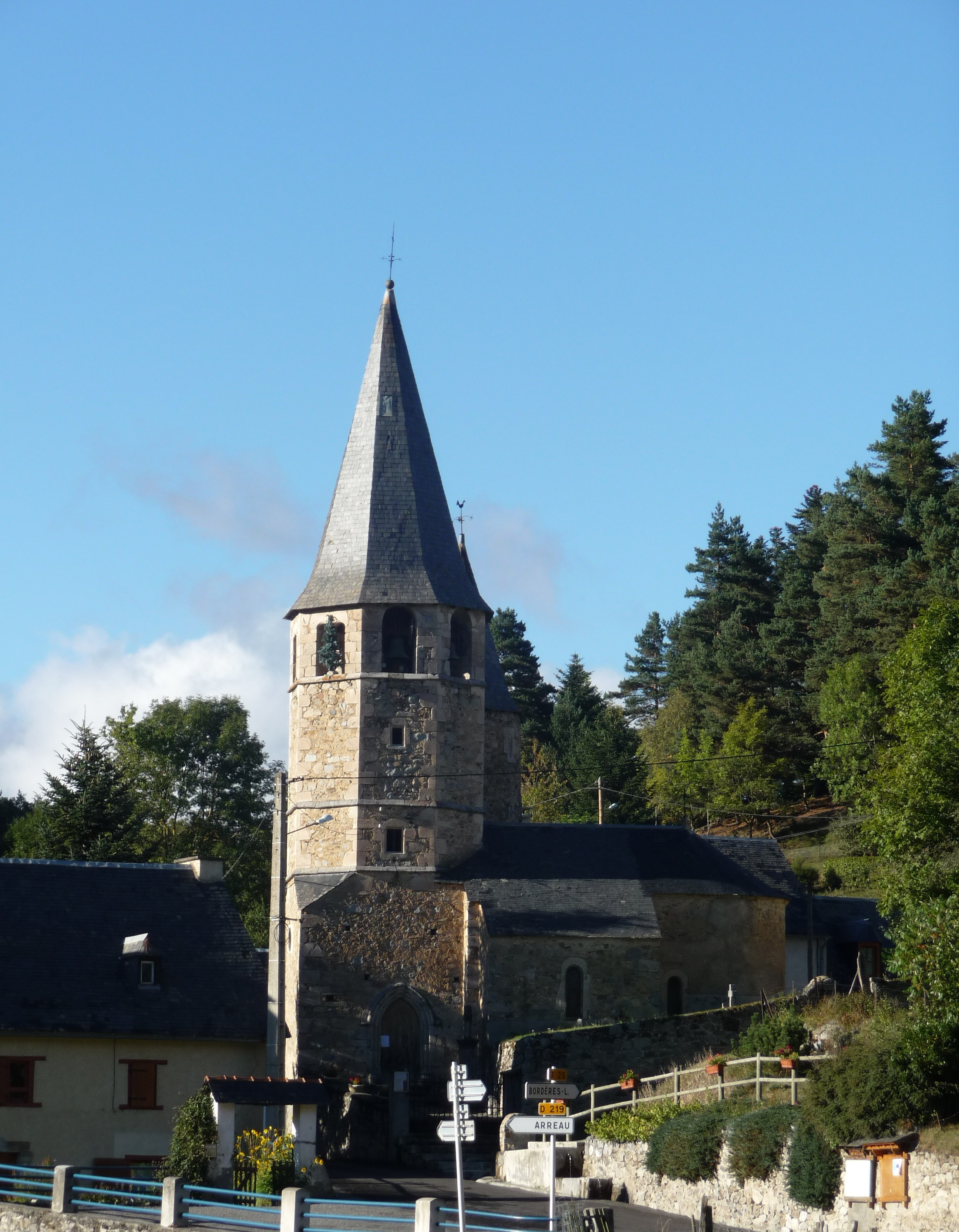 Lançon (Hautes-Pyrénées, France), église Ste Eulalie.